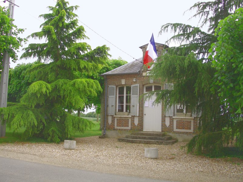 La Mairie de Rouvray (Eure)